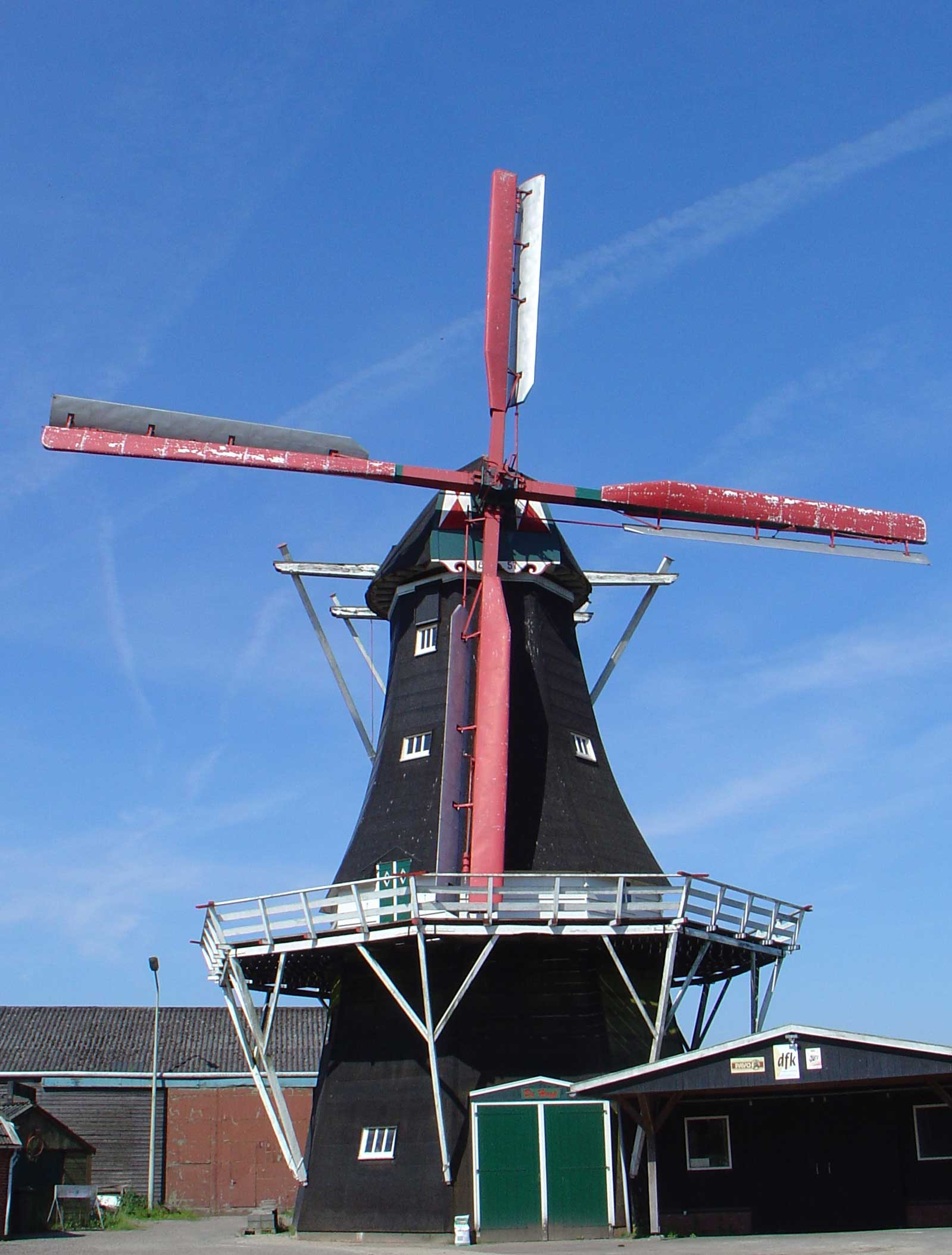 molen de Hoop in Norg